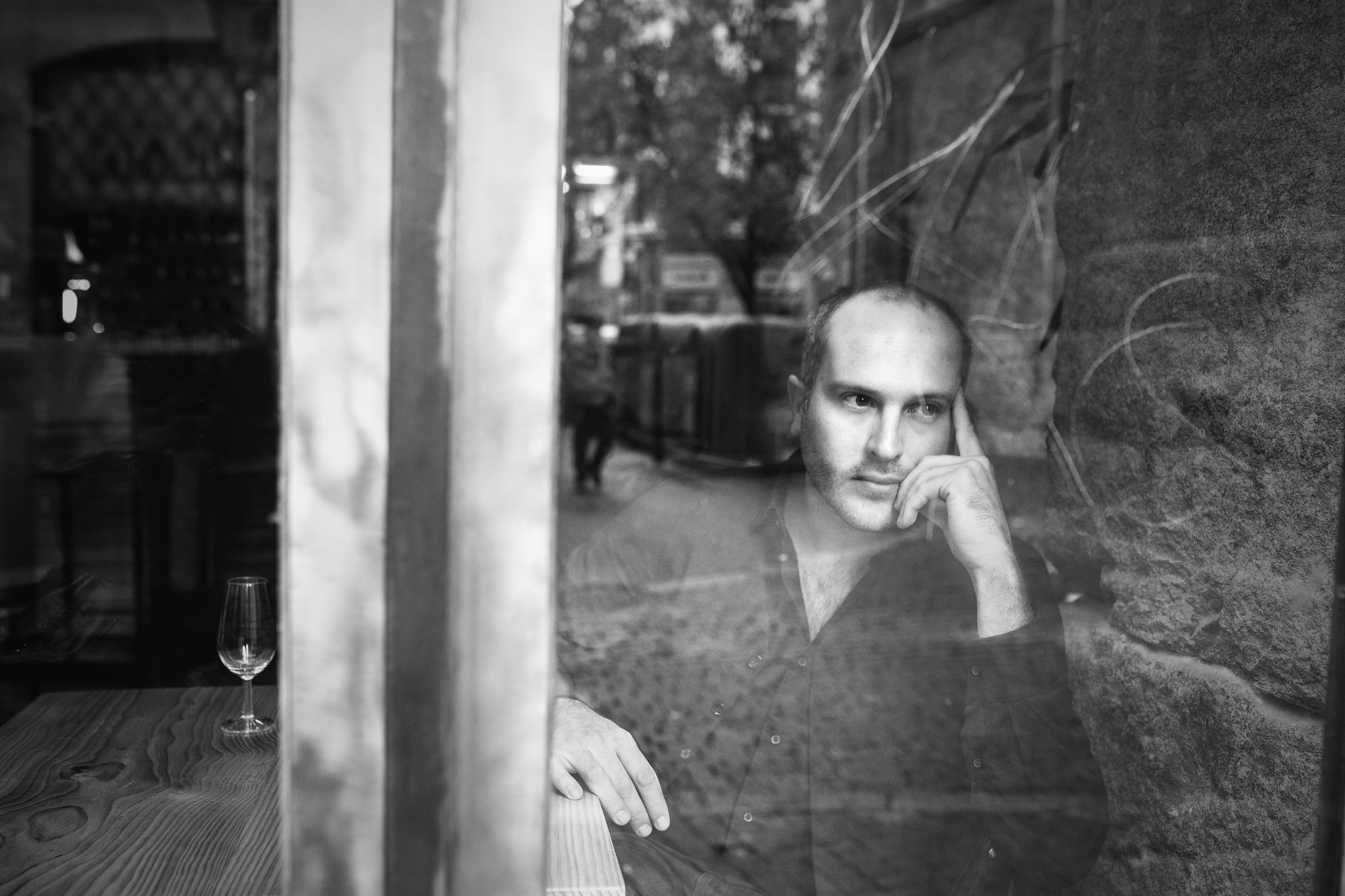 Rafa Caballero, cantante y compositor.